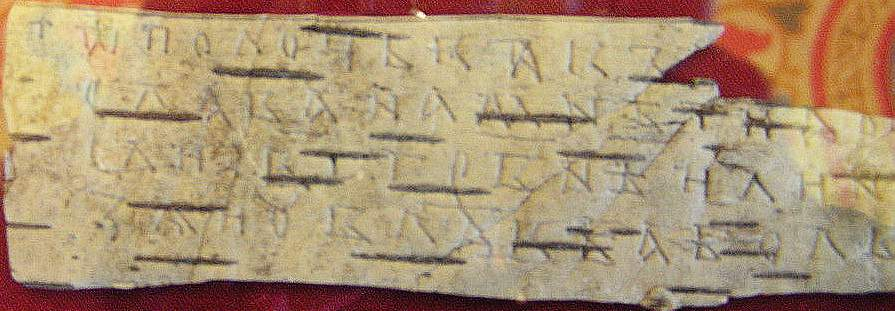 Фотография берестяной грамоты № 155, хранящейся в Государственном историческом музее, г. Москва